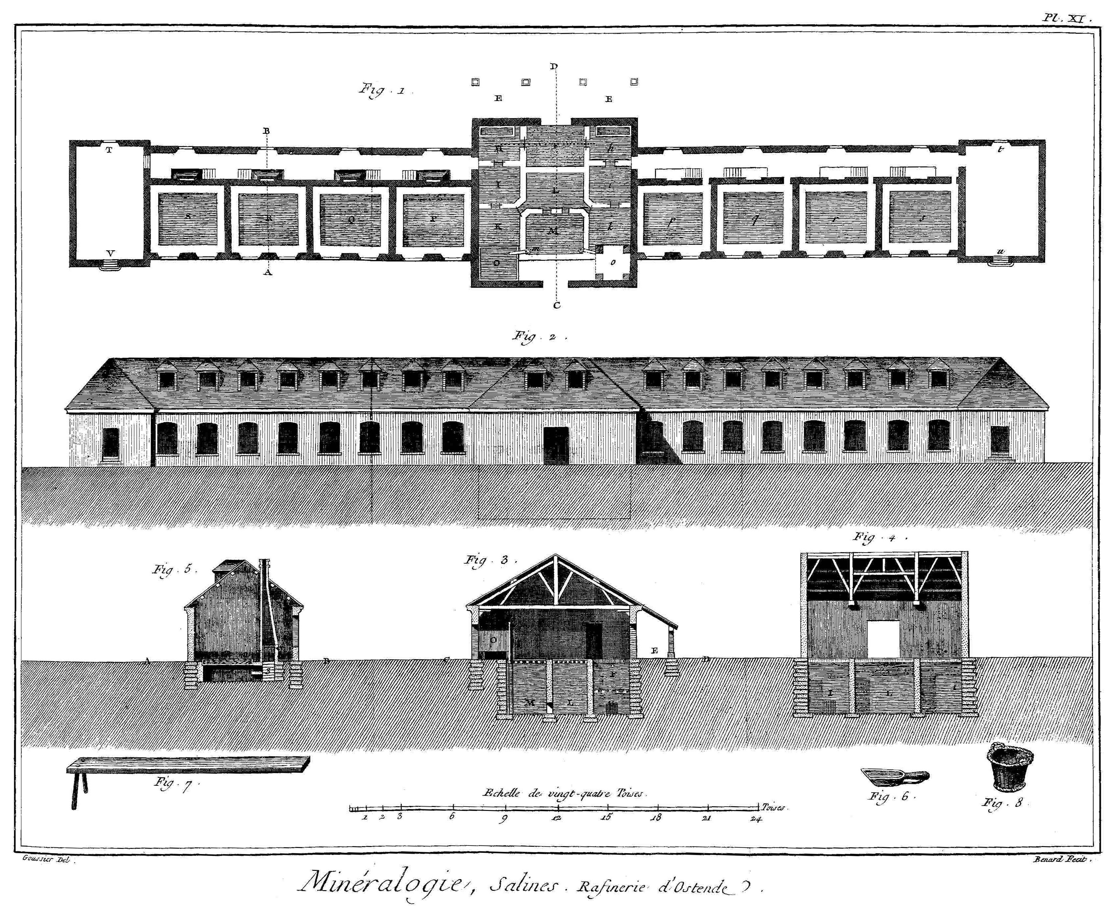 Planches de l'Encyclopédie de Diderot et d'Alembert, volume 5, Histoire Naturelle : Métallurgie et Minéralogie : Le Sel, Pl. 11.